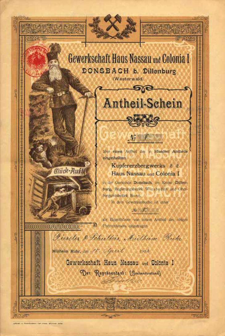 Kux (Anteilschein) der Gewerkschaft Haus Nassau und Colonia I bei Donsbach (Dillenburg) im Lahn-Dill-Kreis/Hessen